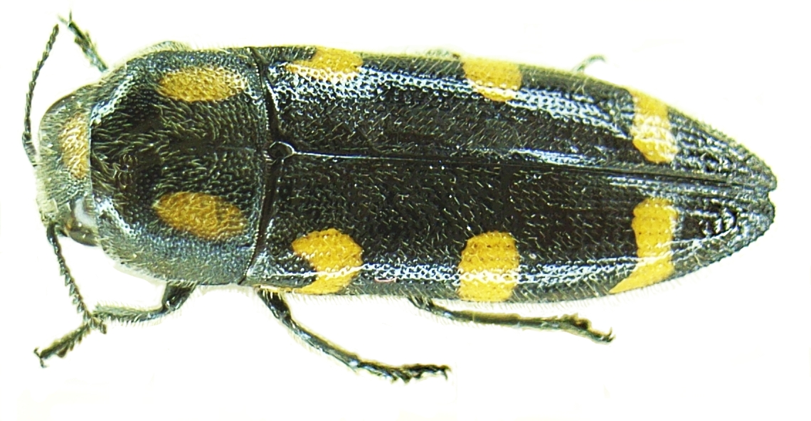 Ptosima flavoguttata